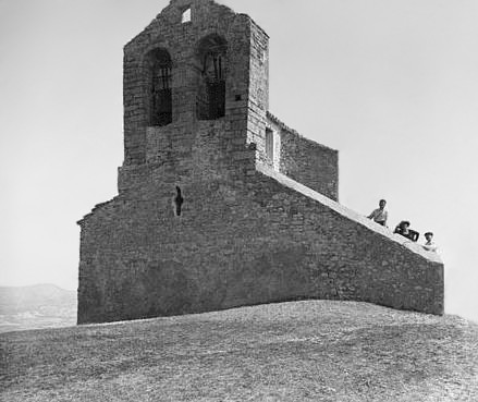 Imatge